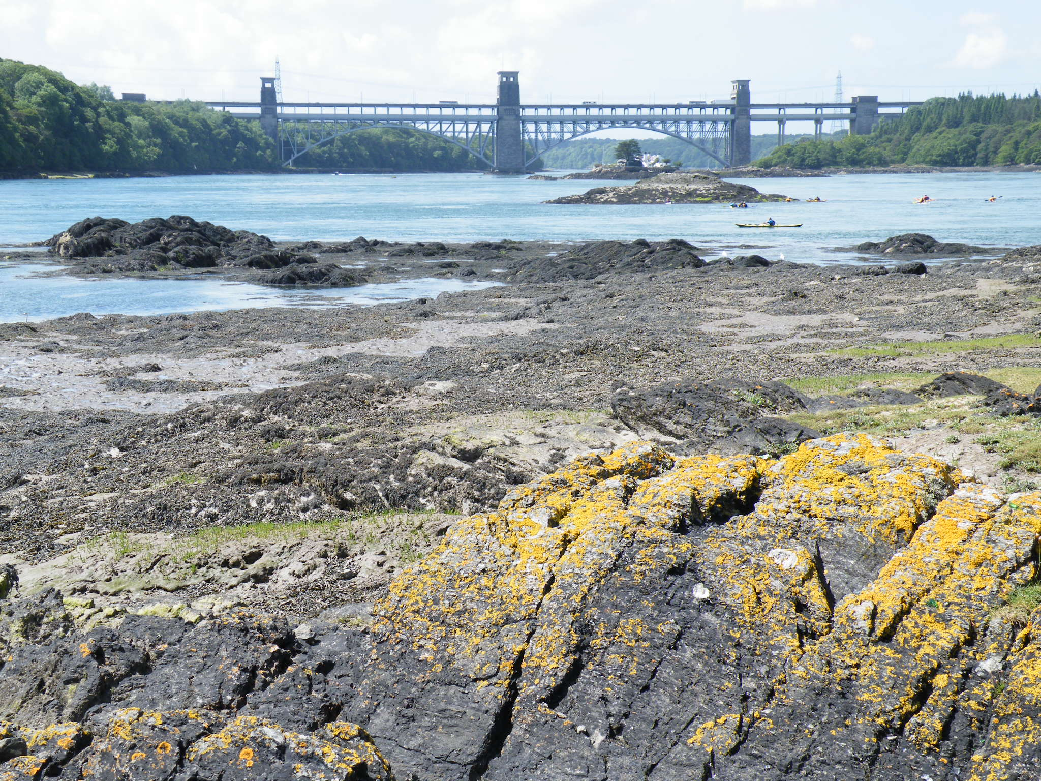 y bont